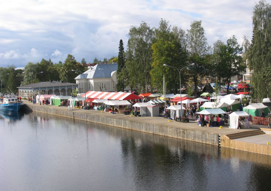 Joensuu Rantapuisto harvest market